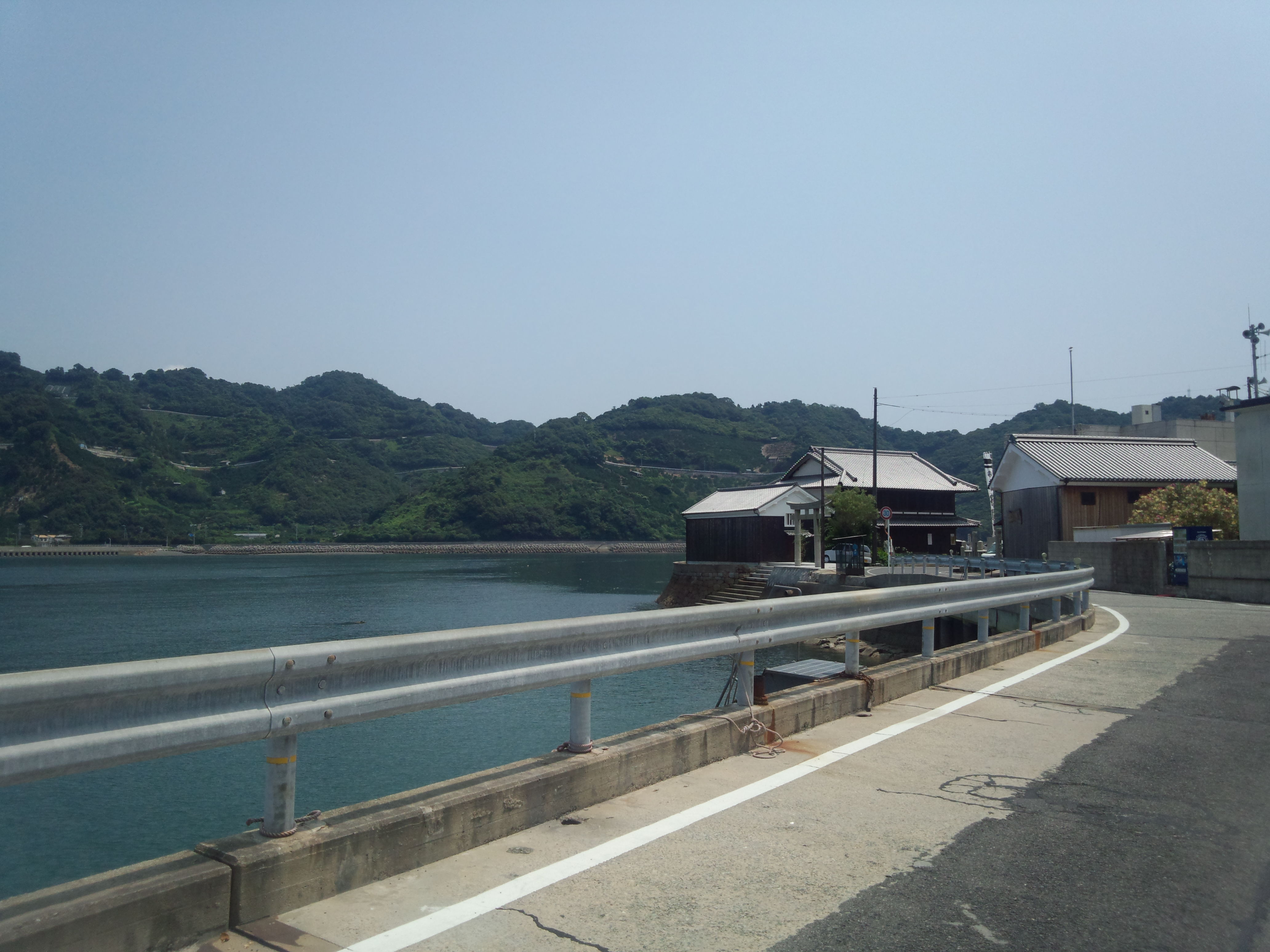 呉市豊町御手洗